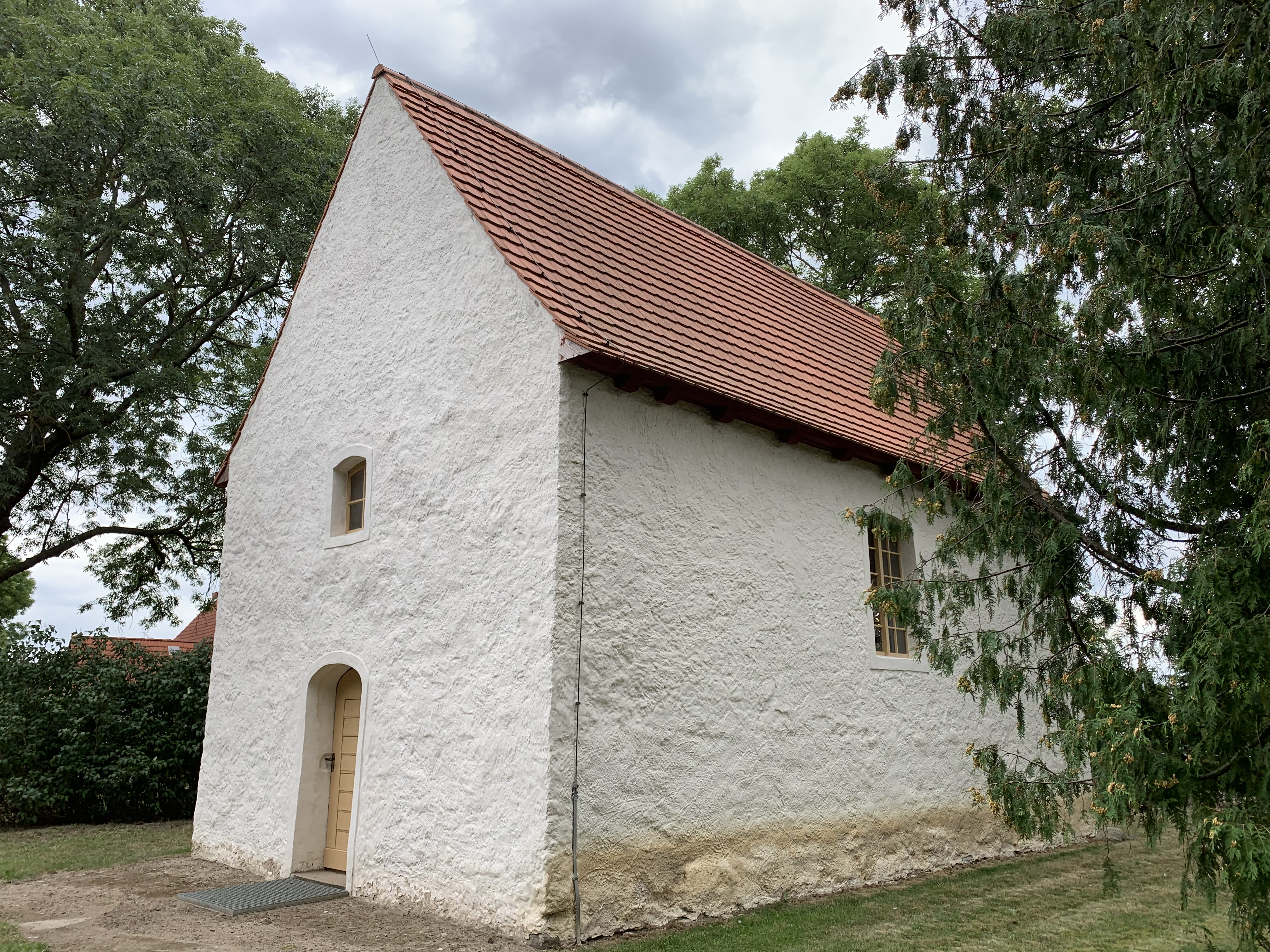 Die Kapelle in Gellendin der Stadt Anklam entstand nach dem Dreißigjährigen Krieg. Im Innern steht eine schlichte, spätbarocke Ausstattung.